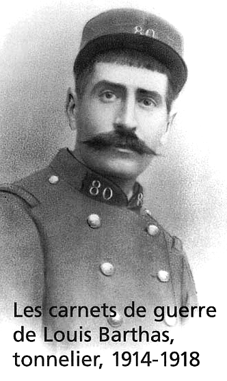 Cover van boek van Louis Barthas